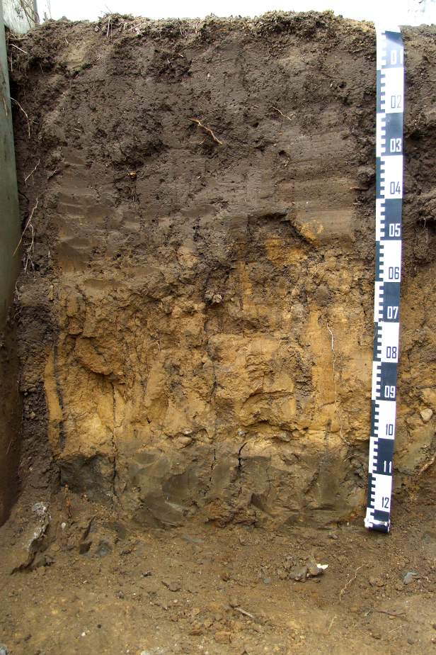 Das begehbare mit einer Abdeckung versehene Schwarzerdeprofil Asel an dem Aufschluss unweit der früheren Tongrube